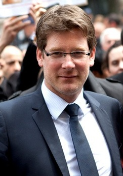 Le ministre du développement avec Aung Sang Suu Kyi, le 26 juin 2012.